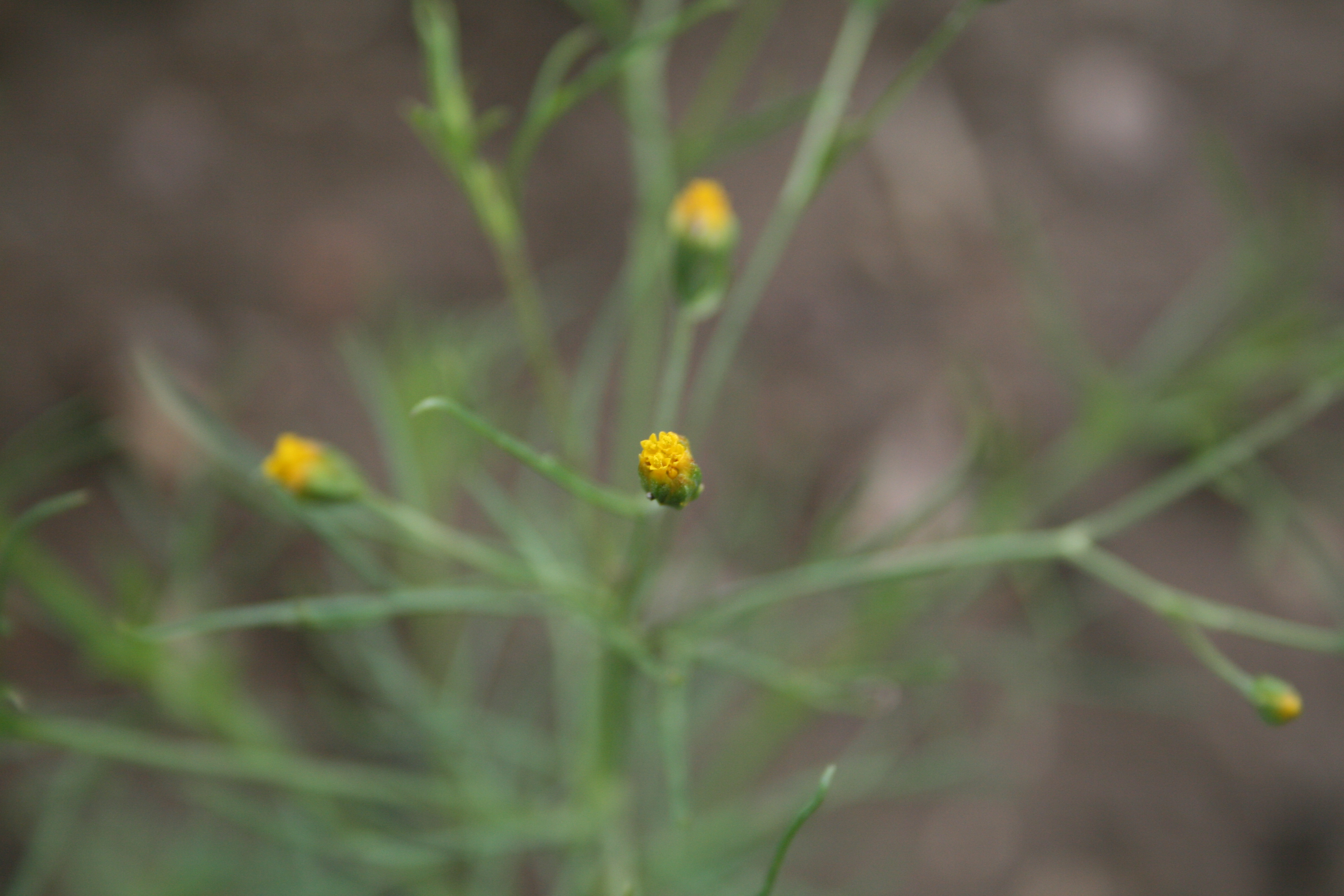 Schkuhria